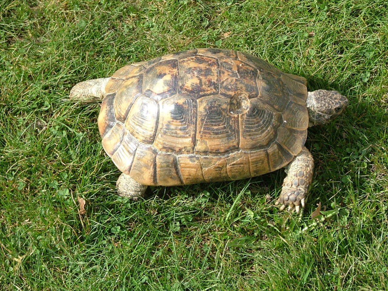 Testudo graeca ibera